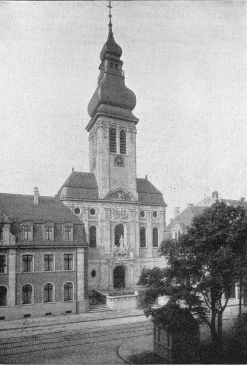 Marienkirche Offenbach am Main kurz nach der Fertigstellung im Jahre 1913